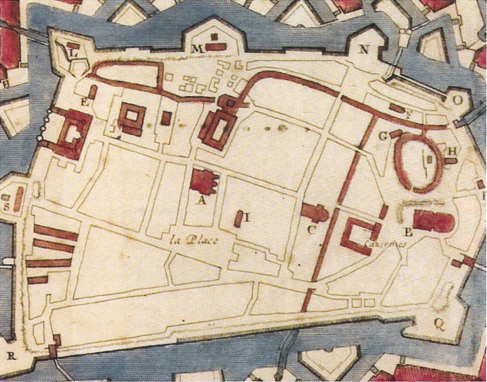 Détail du "Plan de la ville d'Aire et du fort Saint François"